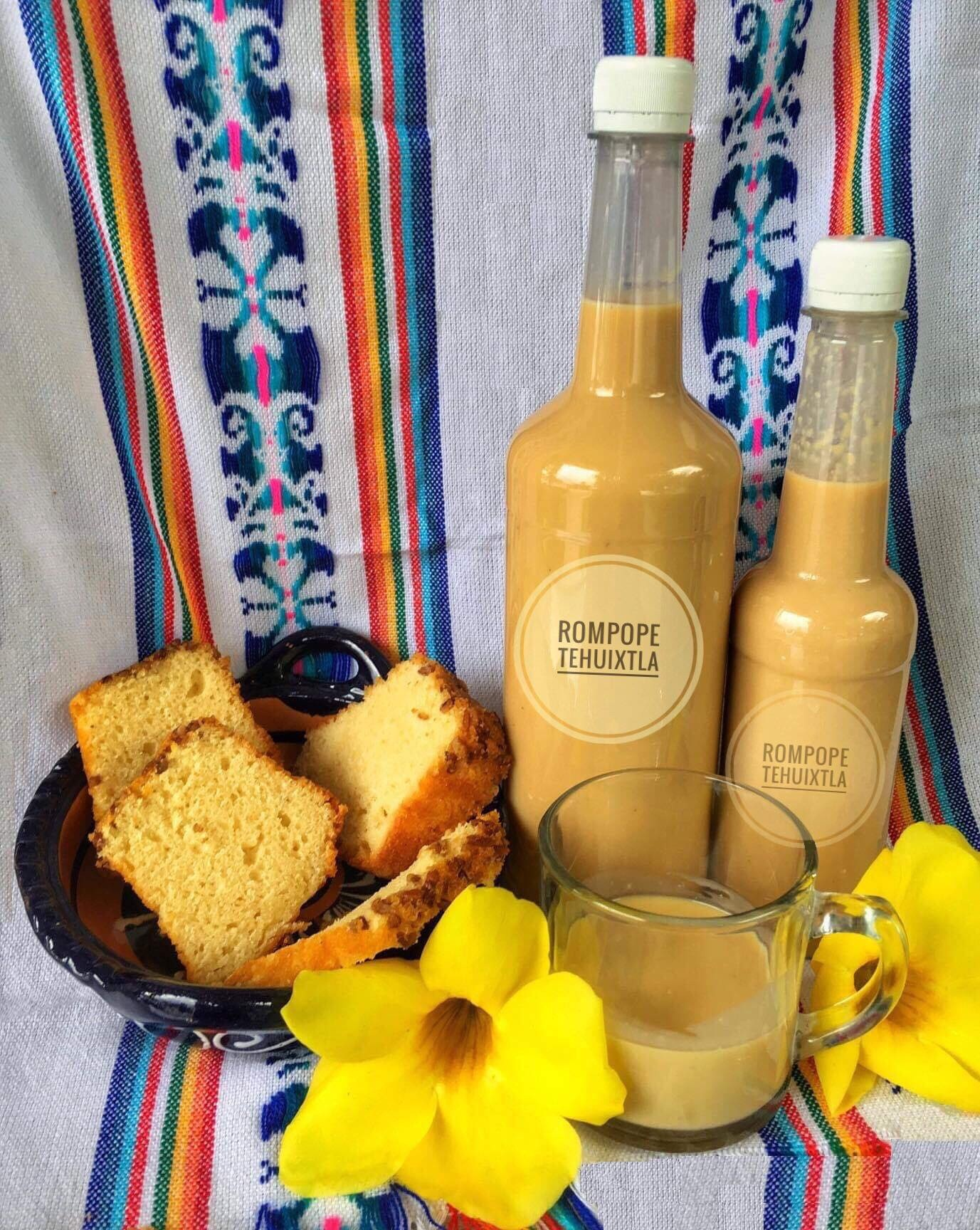 Dos botellas de rompope de Tehuixtla, una taza con el sabroso postre y una cazuelita con rebanadas de pan de nuez con dos flores amarillas y una servilleta de fondo.